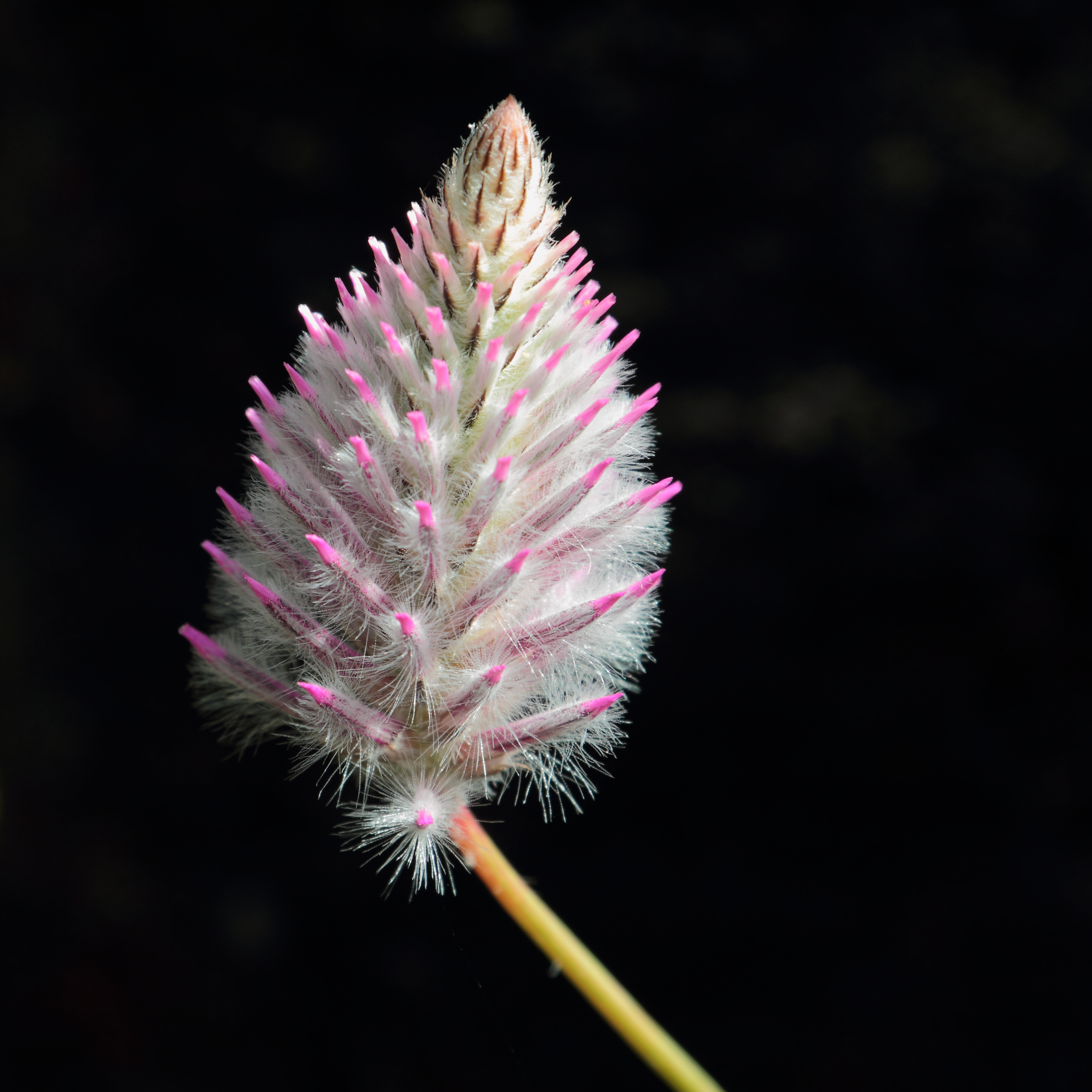 Ptilotus nobilis identifierad med hjälp av befintlig skylt vid Bergianska trädgården.